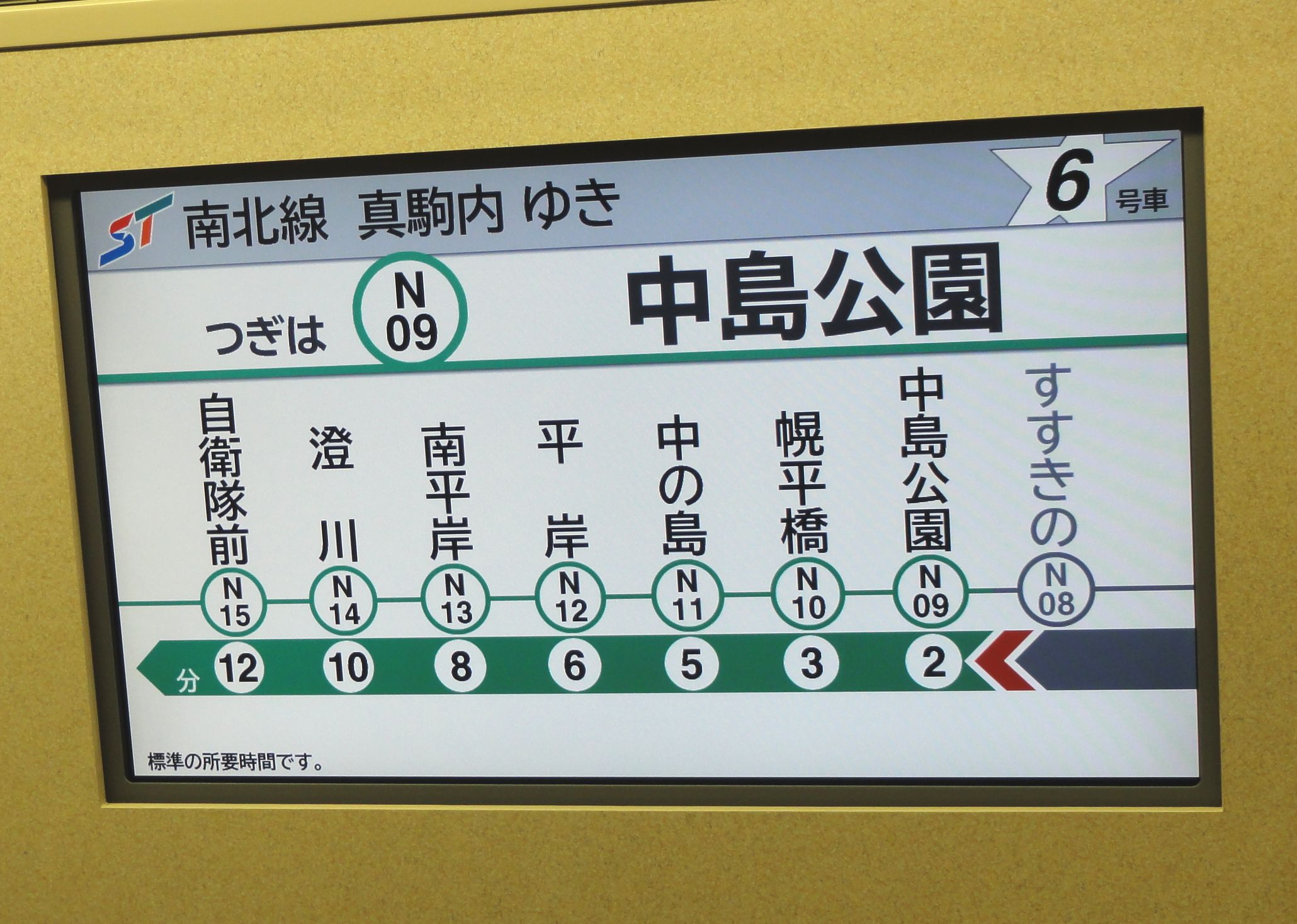 南北線5000形第18編成以降に搭載された車内案内表示の液晶ディスプレイ